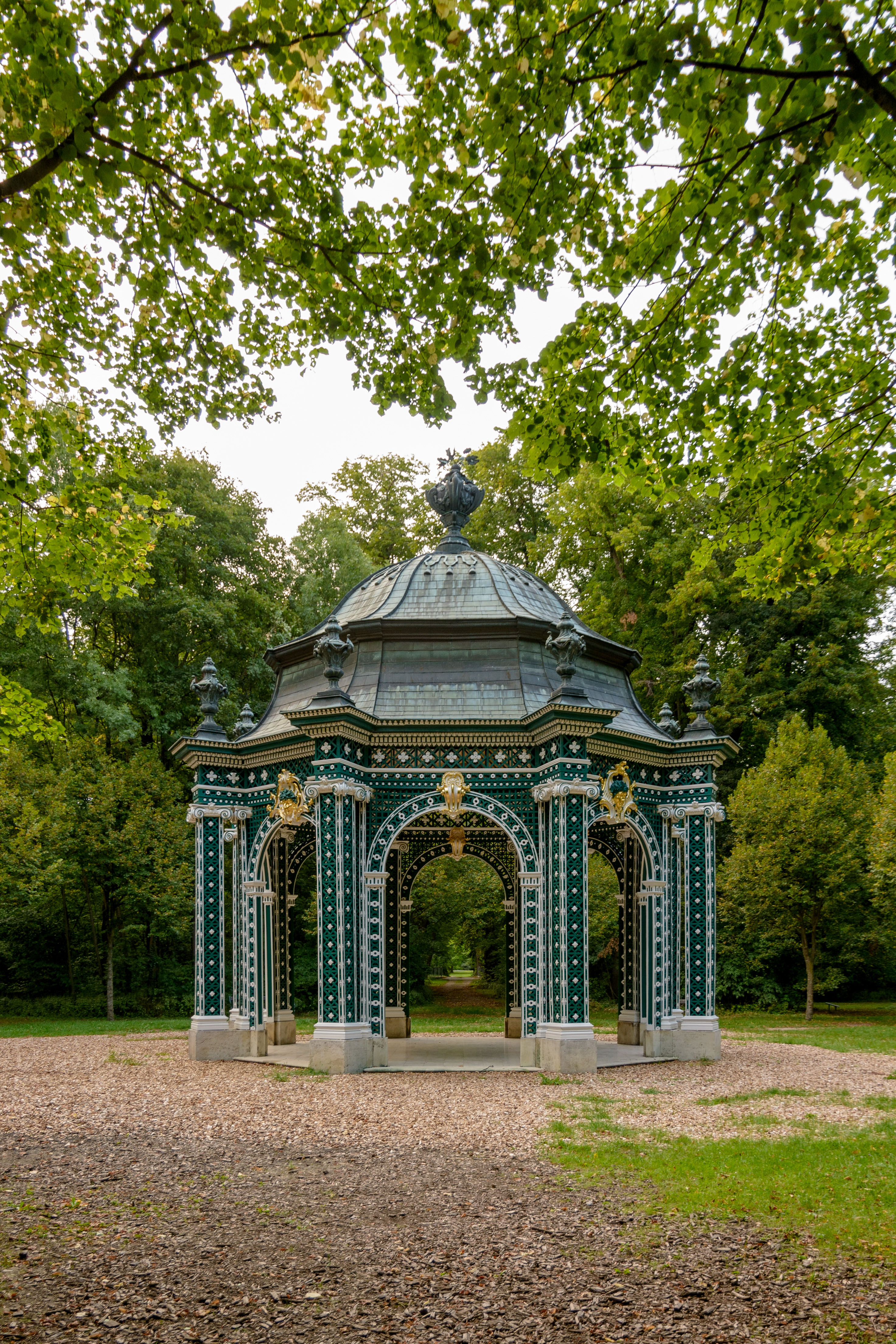 Lusthaus Dianatempel Laxenburg